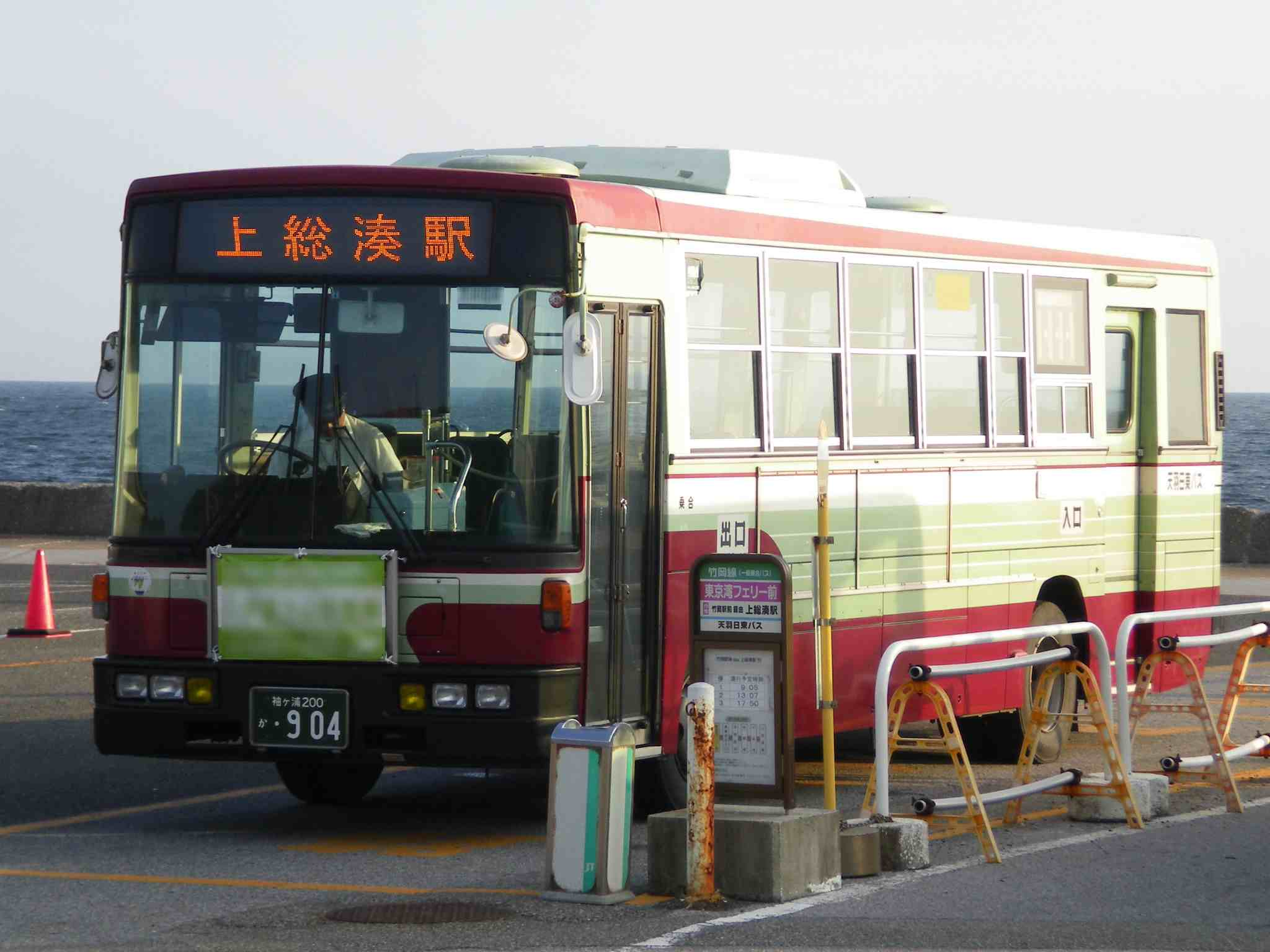 日産ディーゼル・スペースランナーRM 袖ケ浦200か904 千葉県富津市・金谷港にて投稿者本人が撮影。